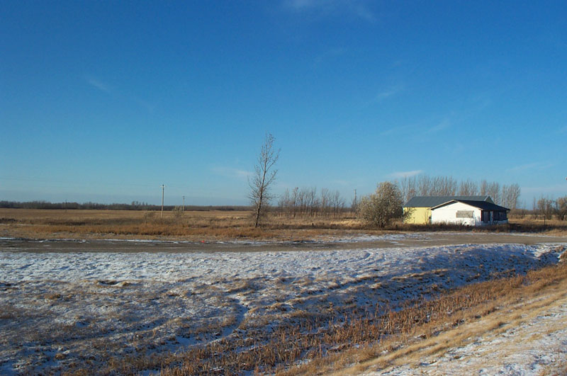 Marcoux Corner, Minnesota